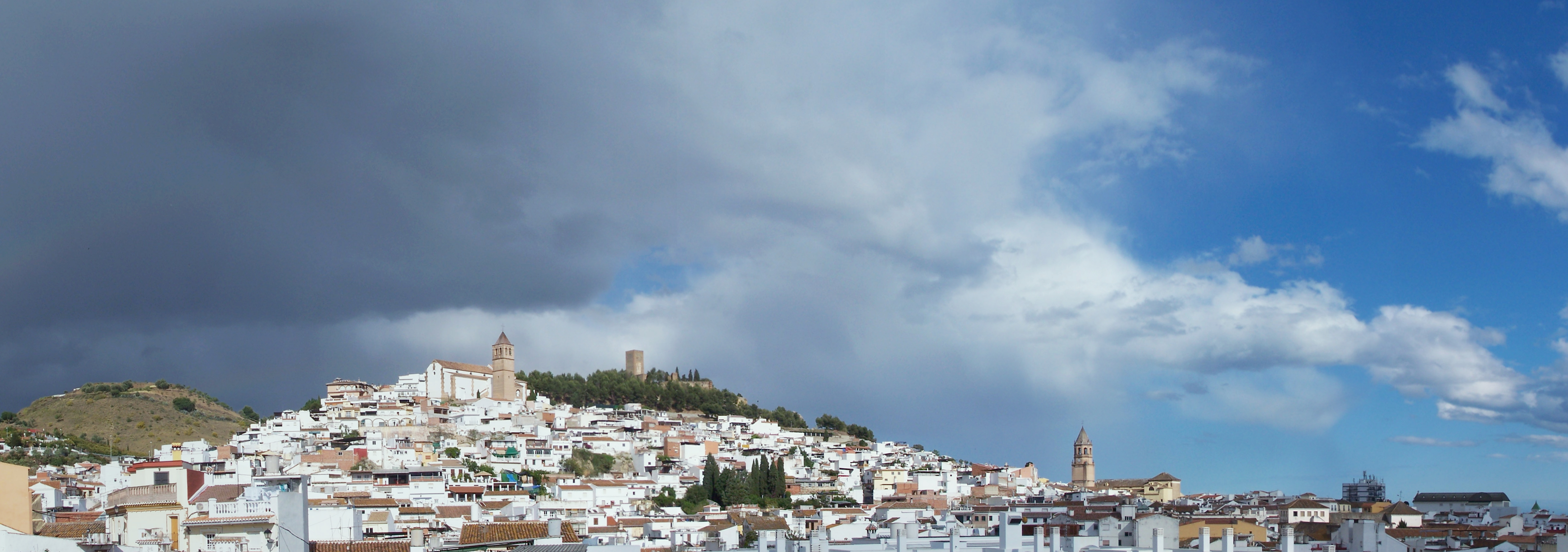 Vista panorámica, obtenida uniendo varias fotografías, de la localidad malagueña de Vélez-Málaga, tomada el 20 de mayo de 2012